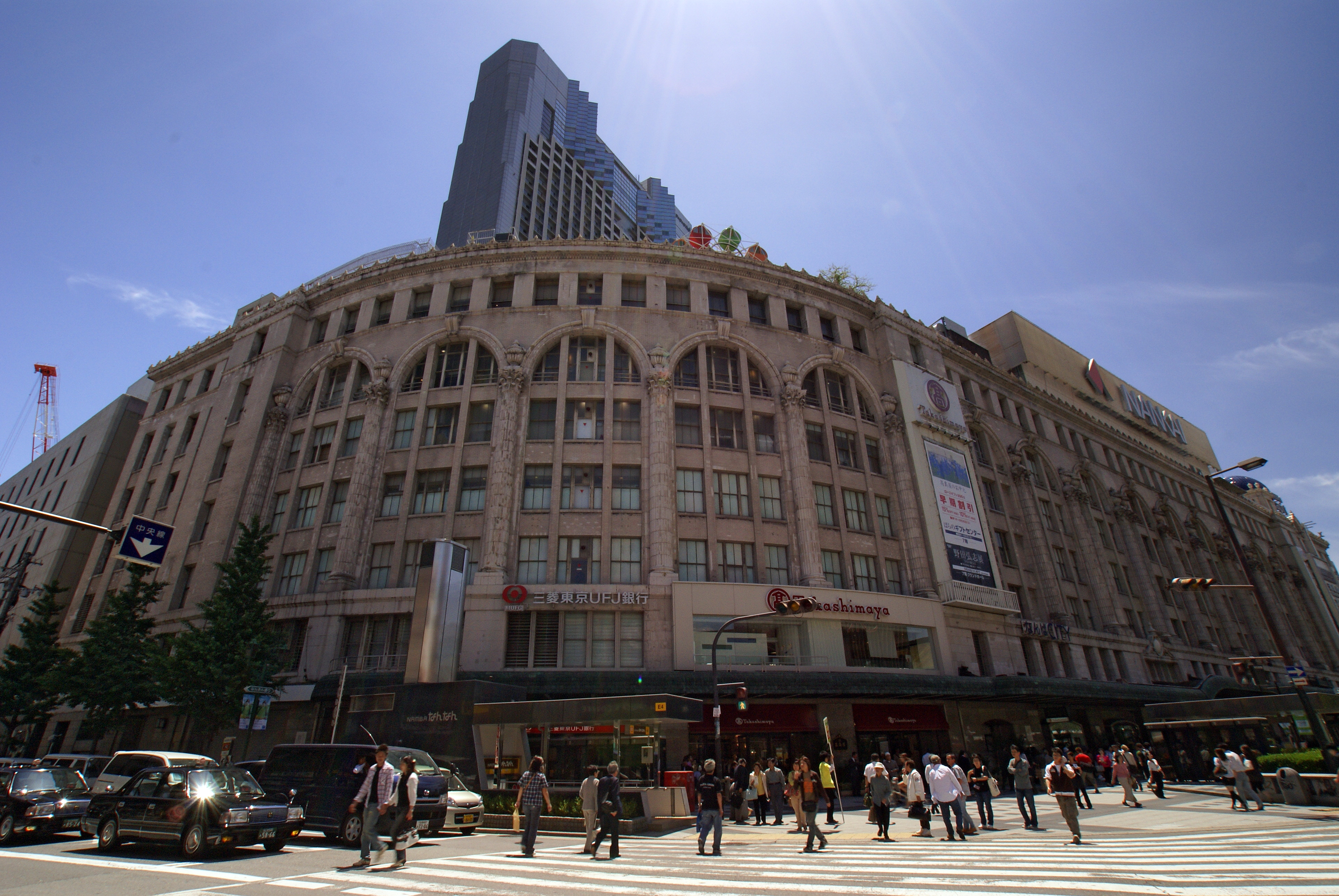 Namba Station and Takashimaya Osaka Department Store in Osaka, Osaka prefecture, Japan